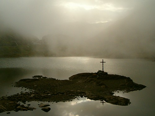 Pashoogte van de Sint Bernard